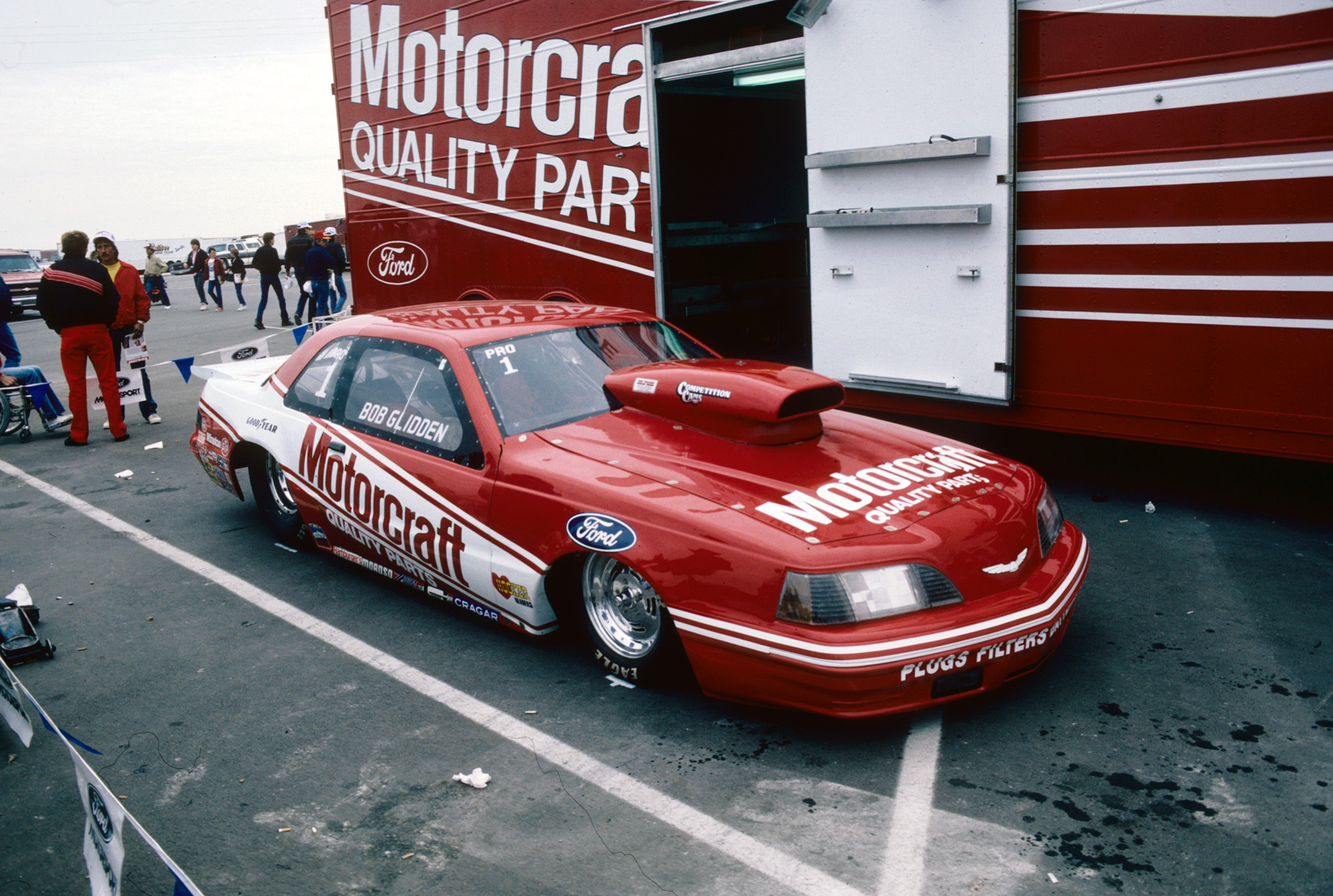 Bob Glidden dragster, Texas Motorplex, April 1987Bob Glidden